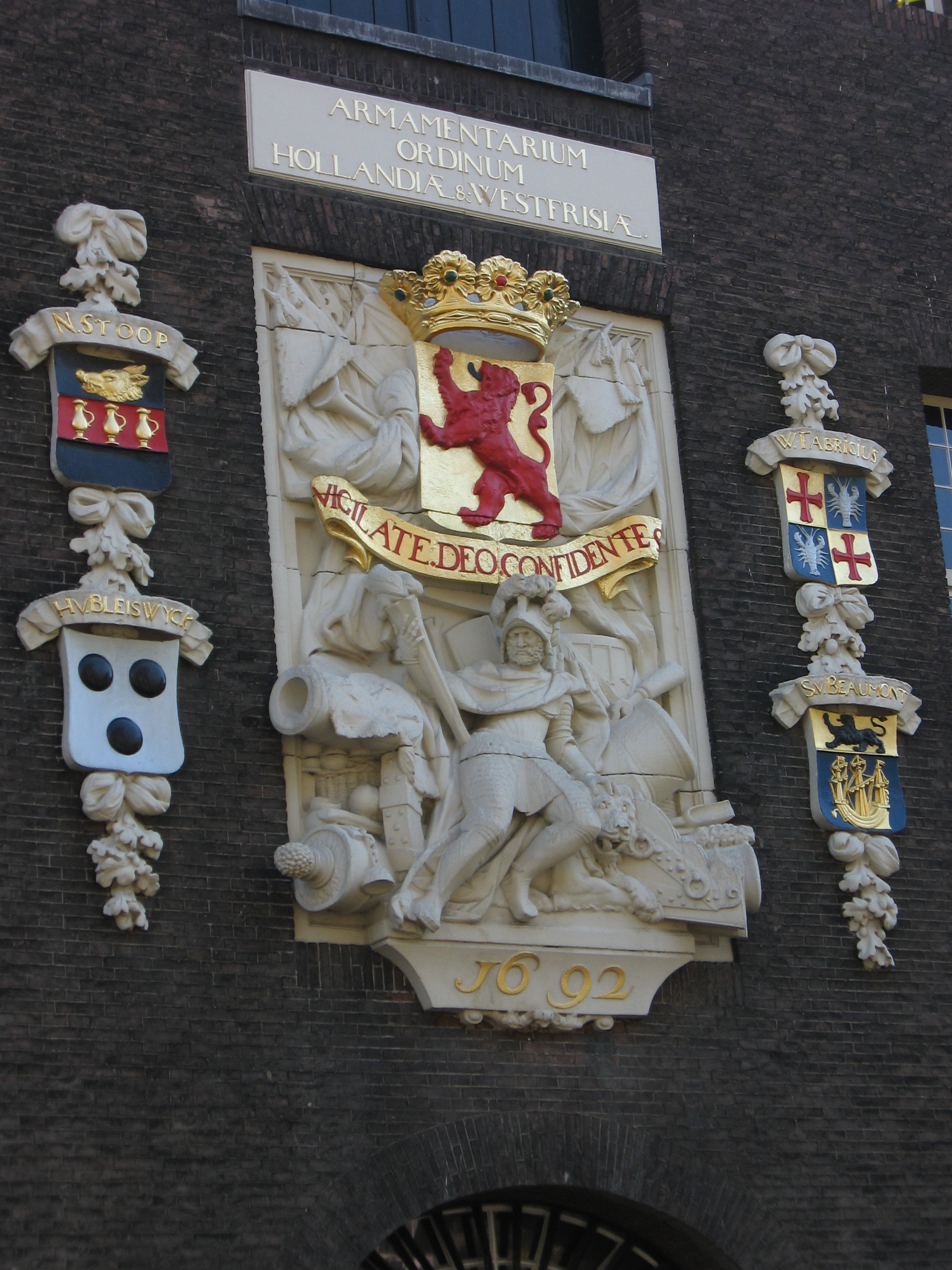 Oude Delft, rijksmonument, Delft